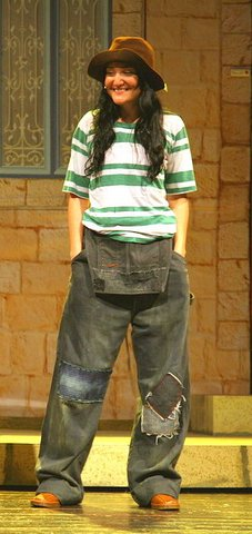 תיאטרון הארצי לנוער-המצחיקה עם העגילים